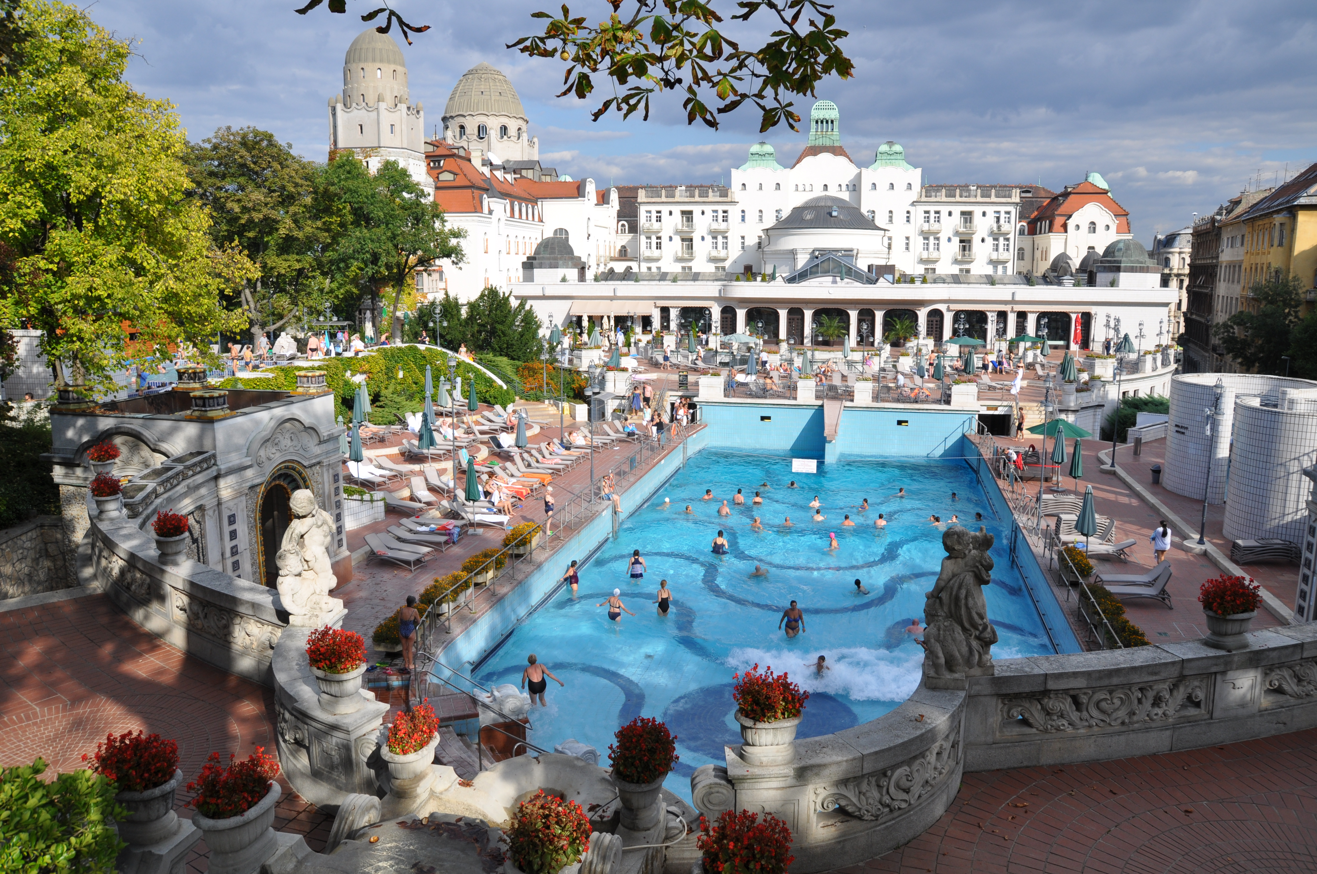 Budapest, Gellért fürdő, hullámfürdő-medence